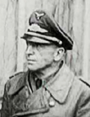 Karl Veith nach den gescheiterten Kapitulationsverhandlungen am 10. April 1945